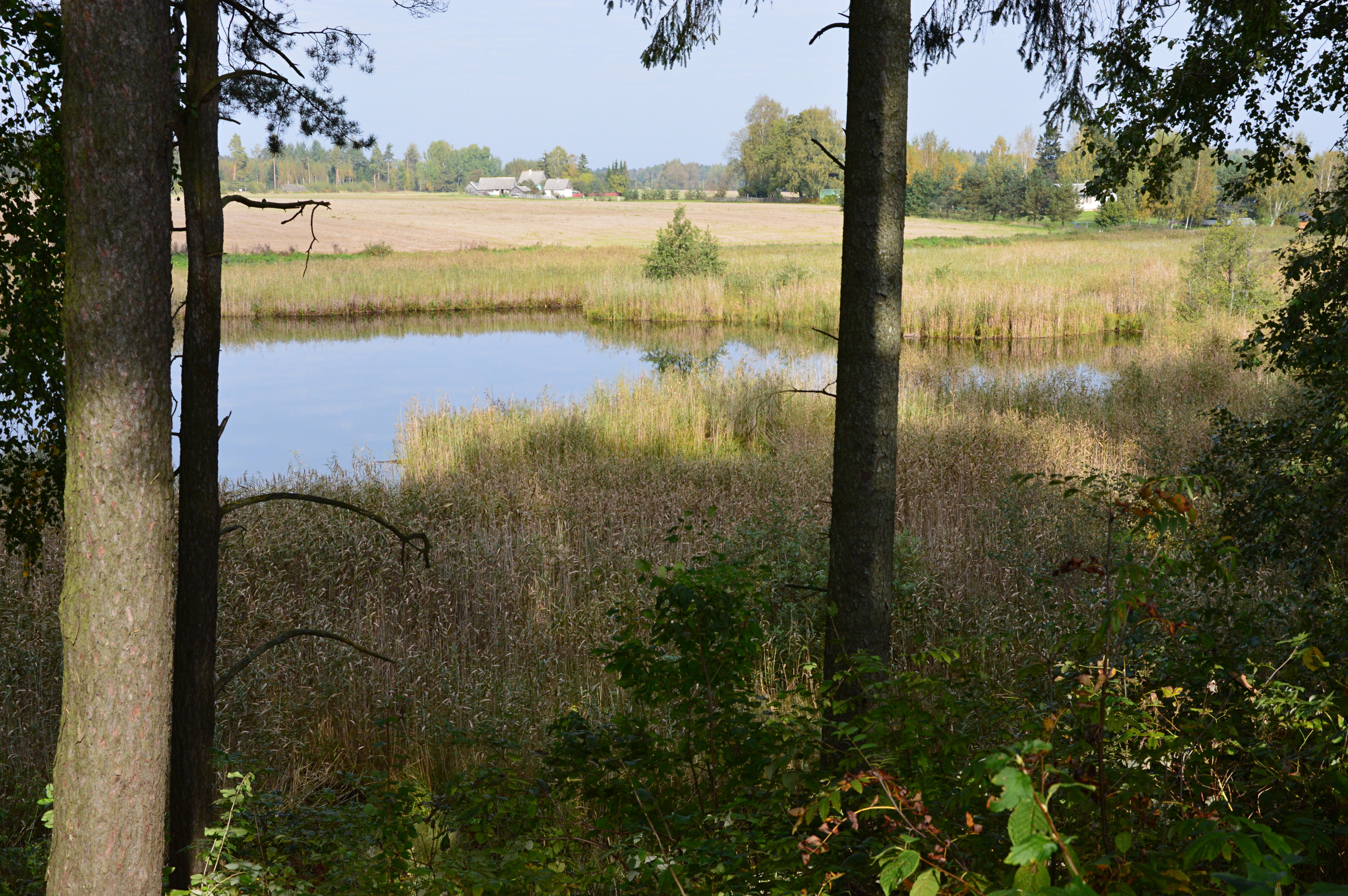 Lavatsi järve hoiuala põhjaosa